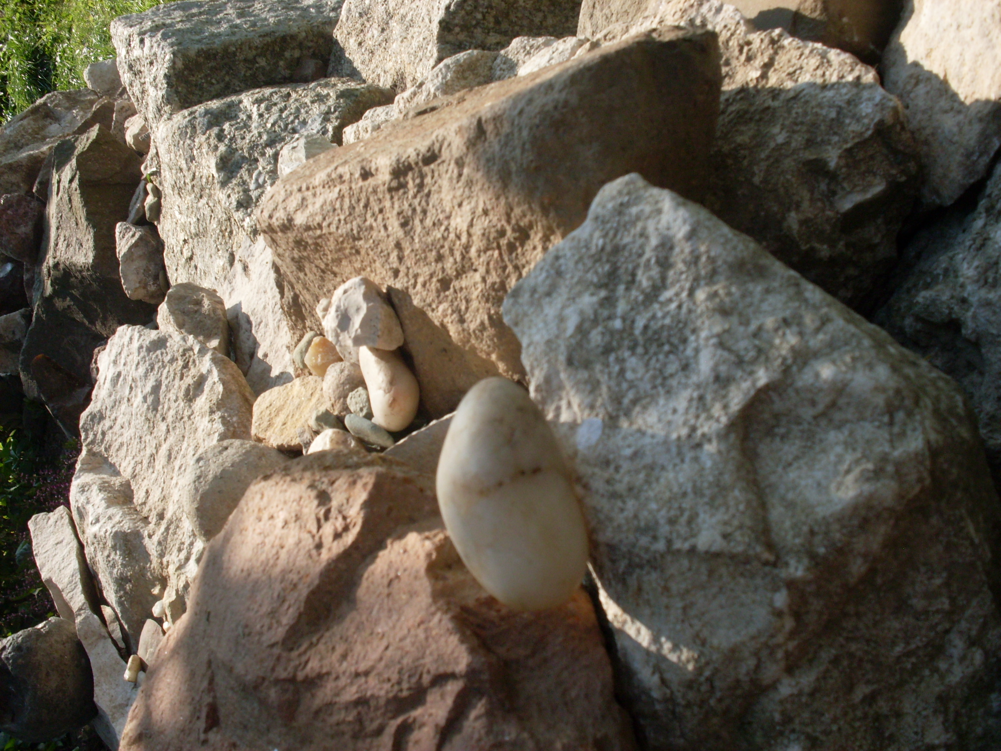 Skały i kamienie w Tenczynku (Podlas)